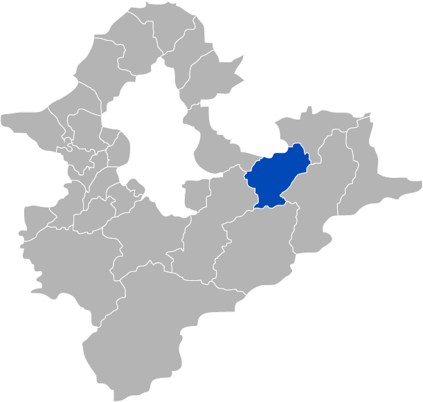 KaurJmeb為編寫臺灣省臺北縣平溪鄉，於2005年2月6日所繪。